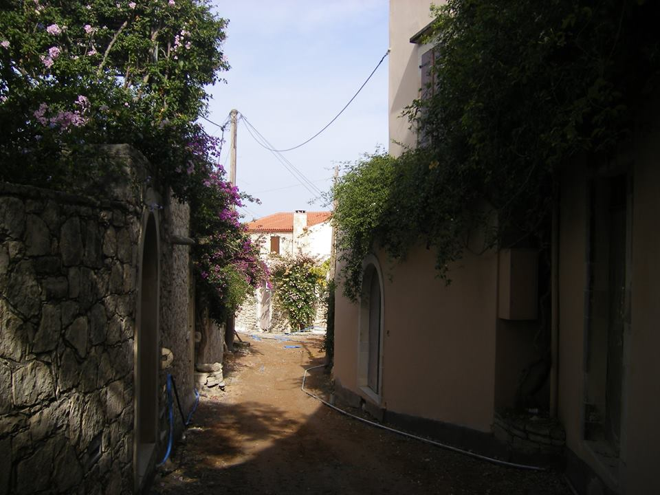 Καλανδαρέ